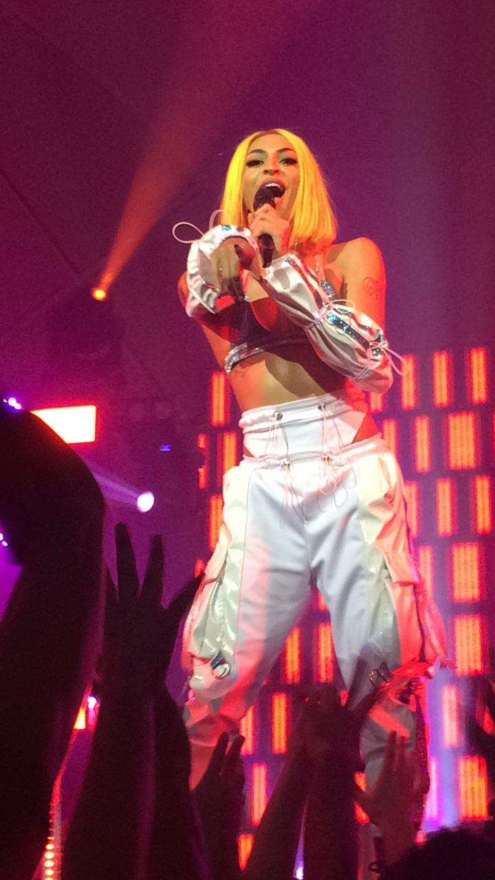 Pabllo Vittar, São Paulo, 2018